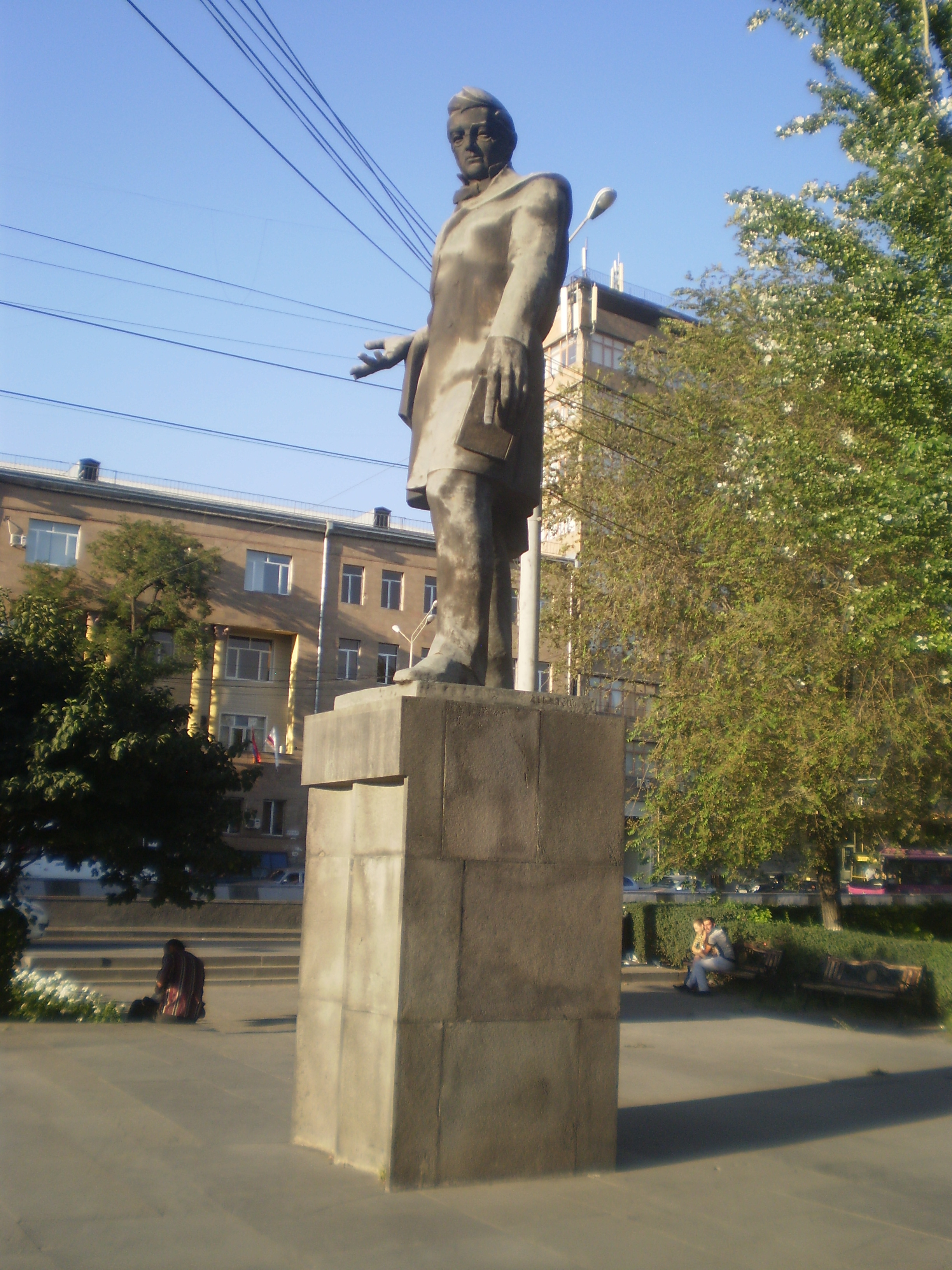 Հուշարձան` Ալեքսանդր Գրիբոյեդովի 6/117